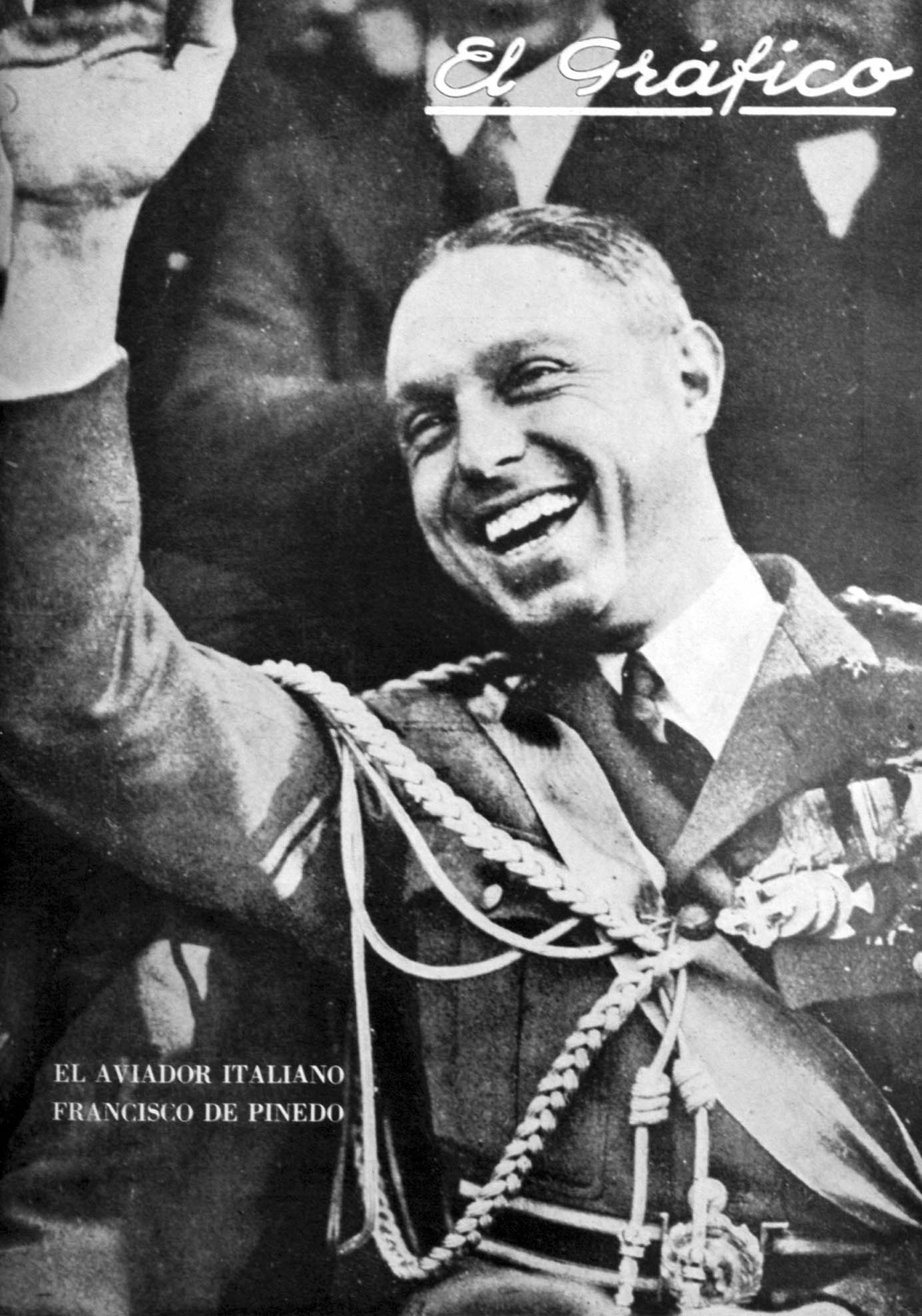 El Grafico del 05 de Marzo de 1927. Edicion 400